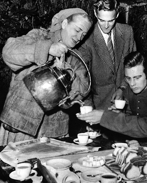 Brita Hertzberg